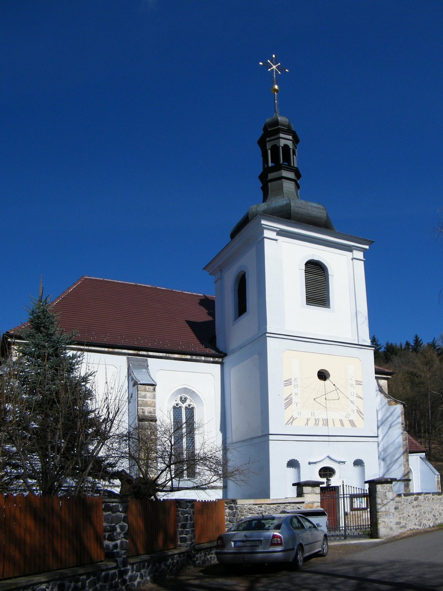 Kostel svaté Anny v Jedlce